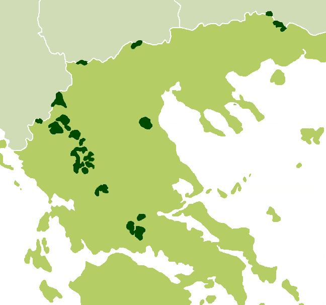 Περιοχές εξάπλωσης του αγριόγιδου στην Ελλάδα